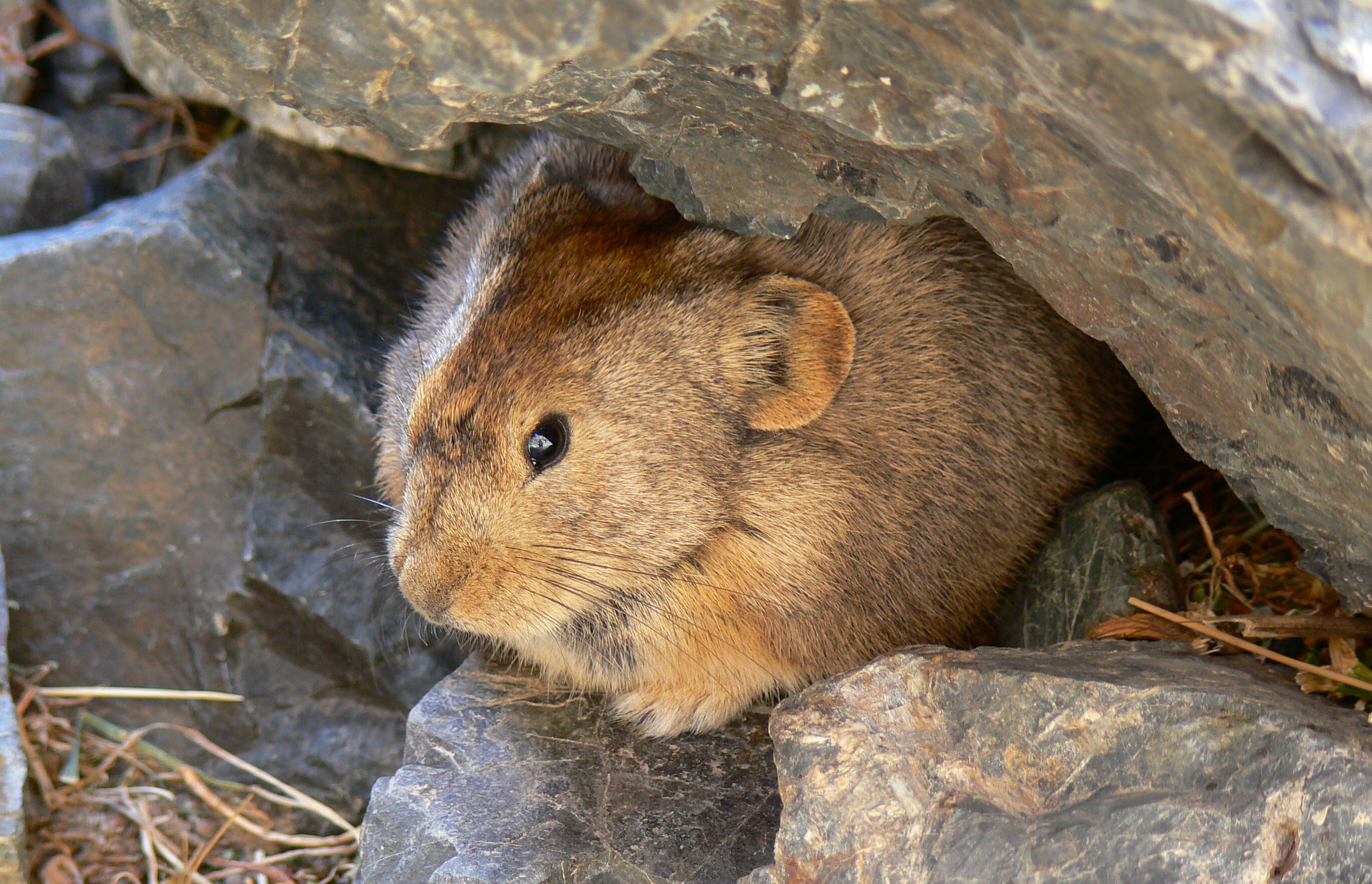 Pfeifhase (Ochotona pallasi); südliche Wüste Gobi (Govi Altayn Nuruu)